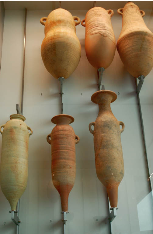 Ánforas fenicias. Museo Nacional de Arqueología Subacuática.